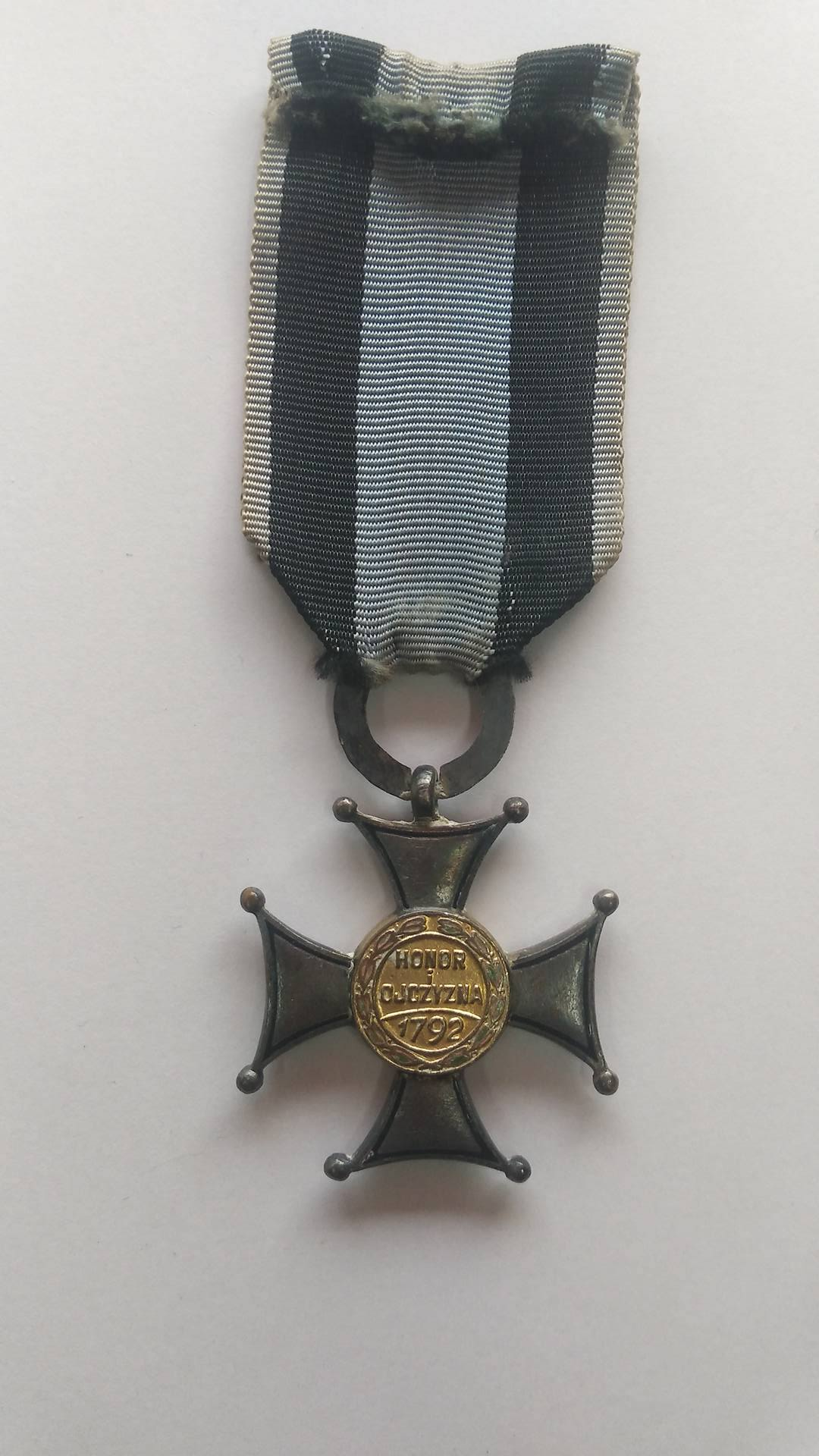 rewers orderu Virtuti Militari